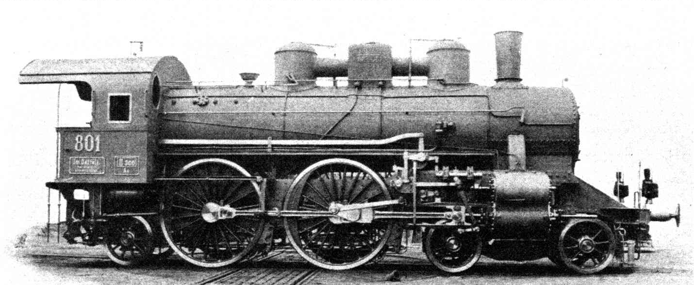 A MÁV Im. osztályú gyorsvonati mozdonya